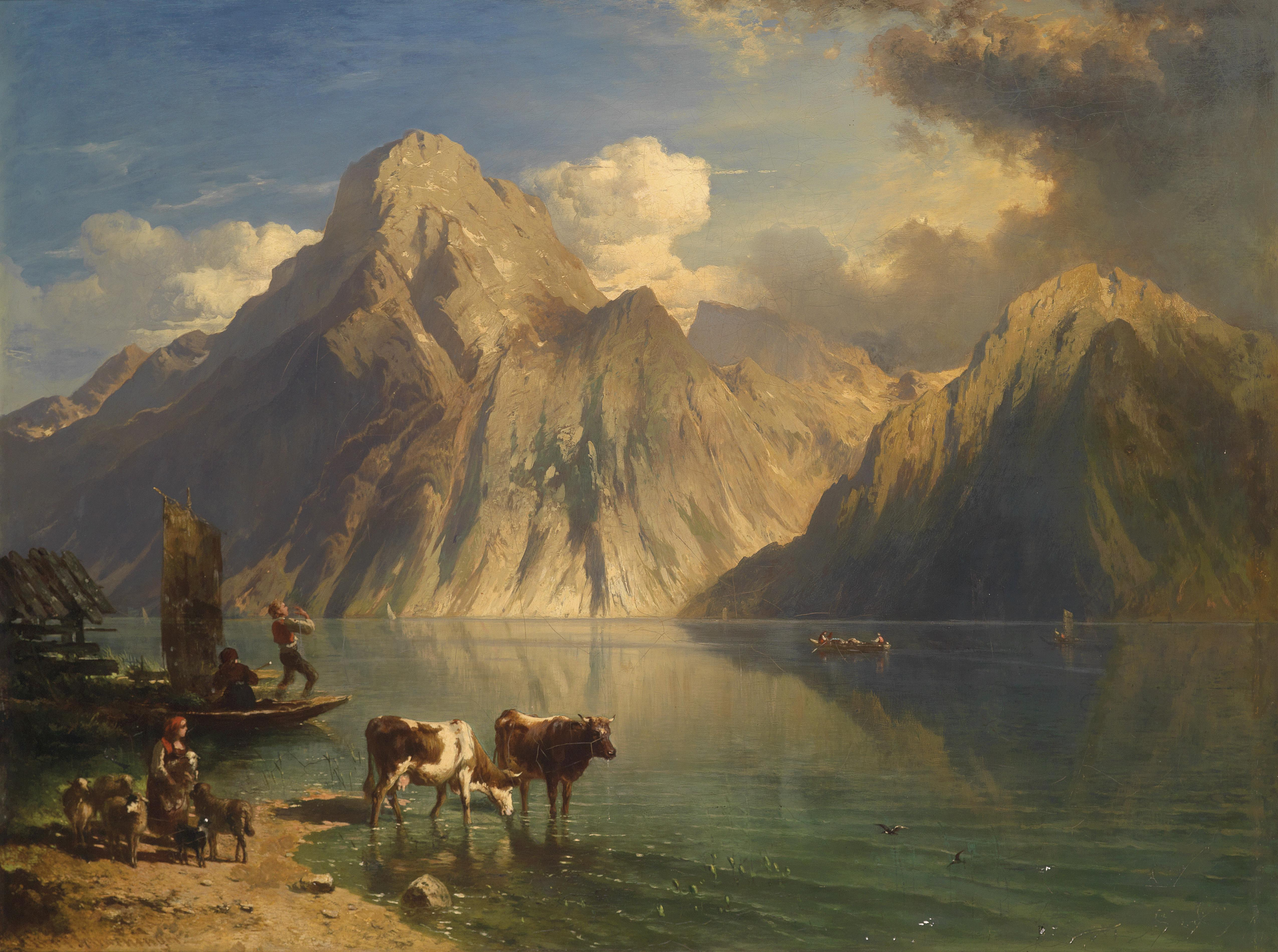 Das Echo vom Traunsteinlabel QS:Lde,"Das Echo vom Traunstein"